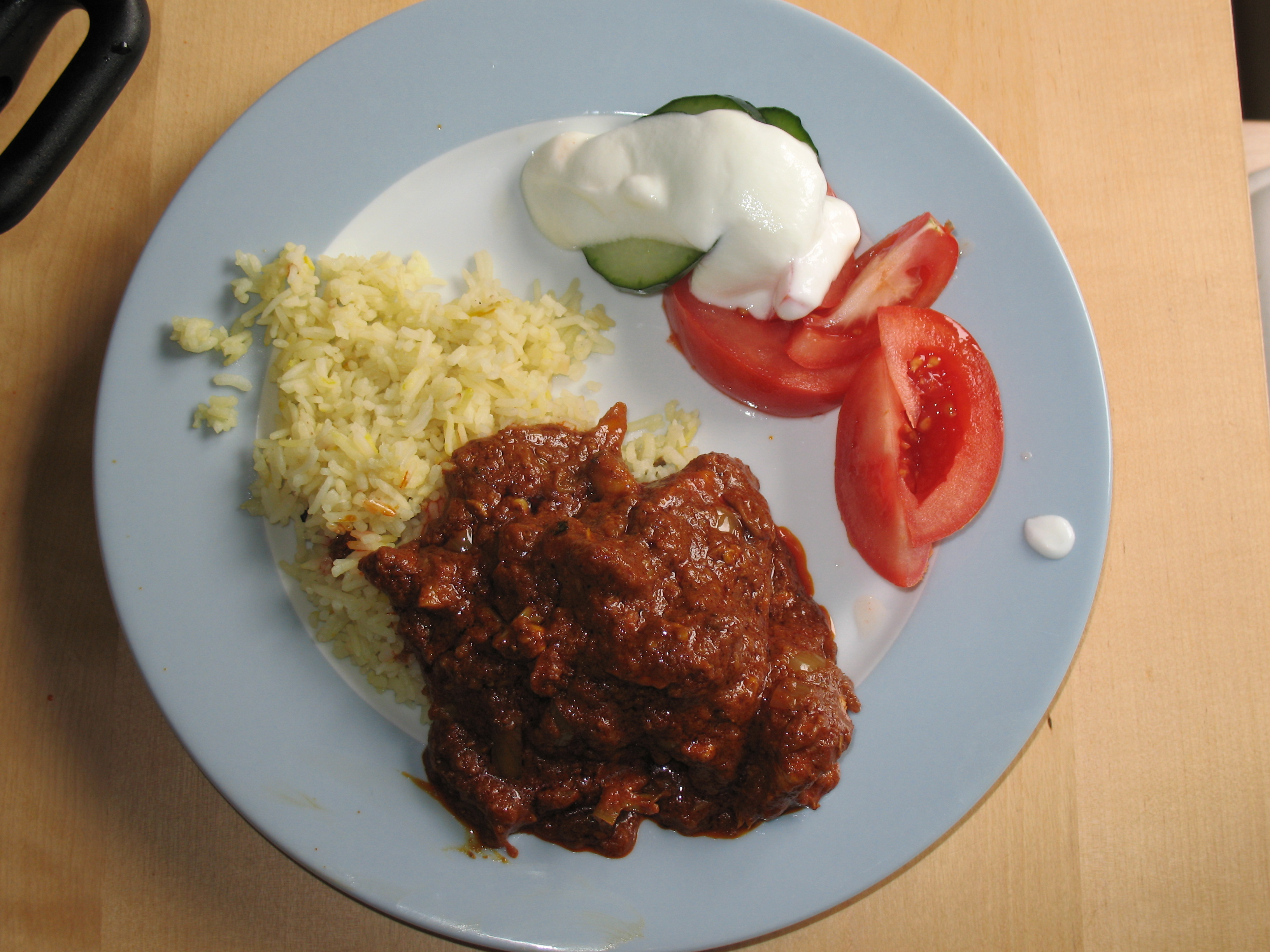 Vindaloo